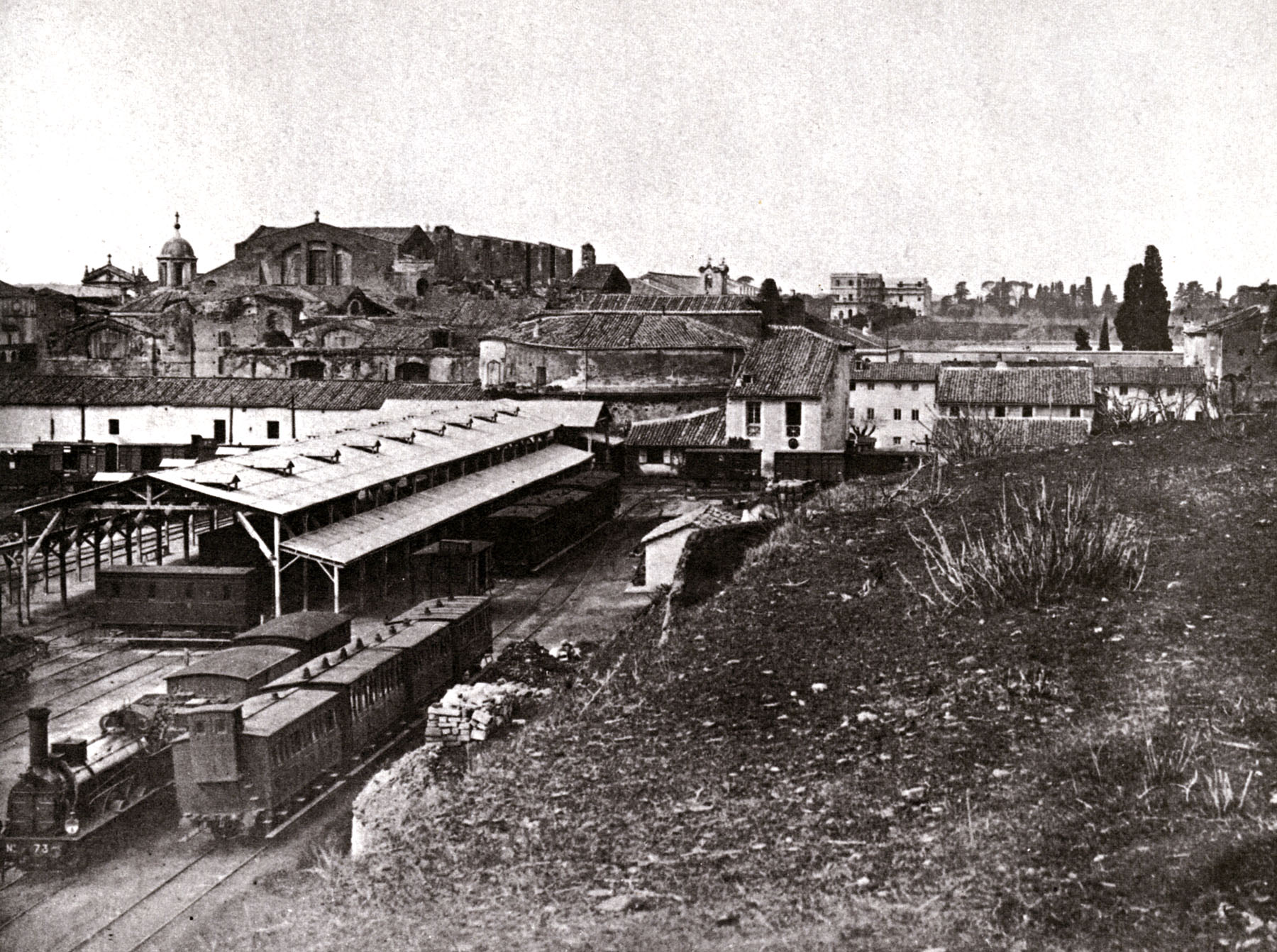 Stazione Termini in una foto d'epoca